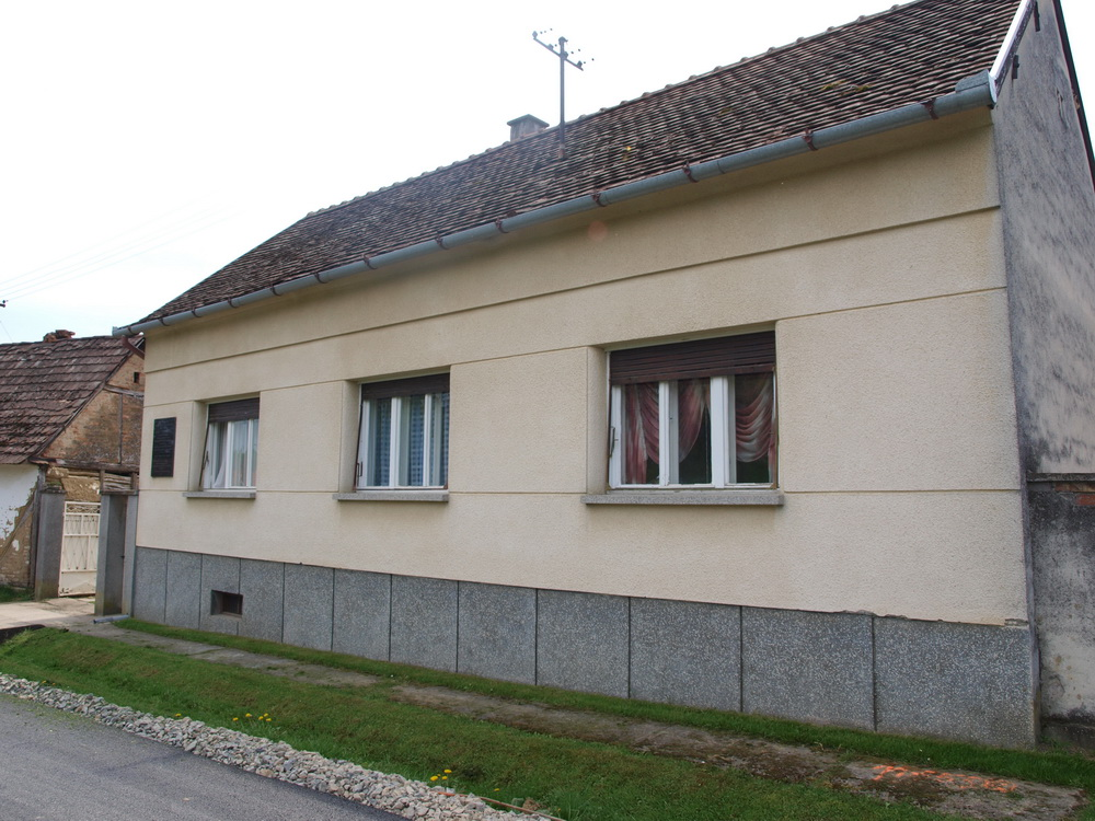 Rodni dom Dragutina Tadijanovića u selu Rastušje, Brodsko-posavska županija.